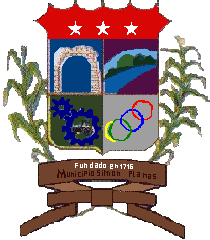 Escudo del municipio Simón Planas. Estado Lara. Venezuela